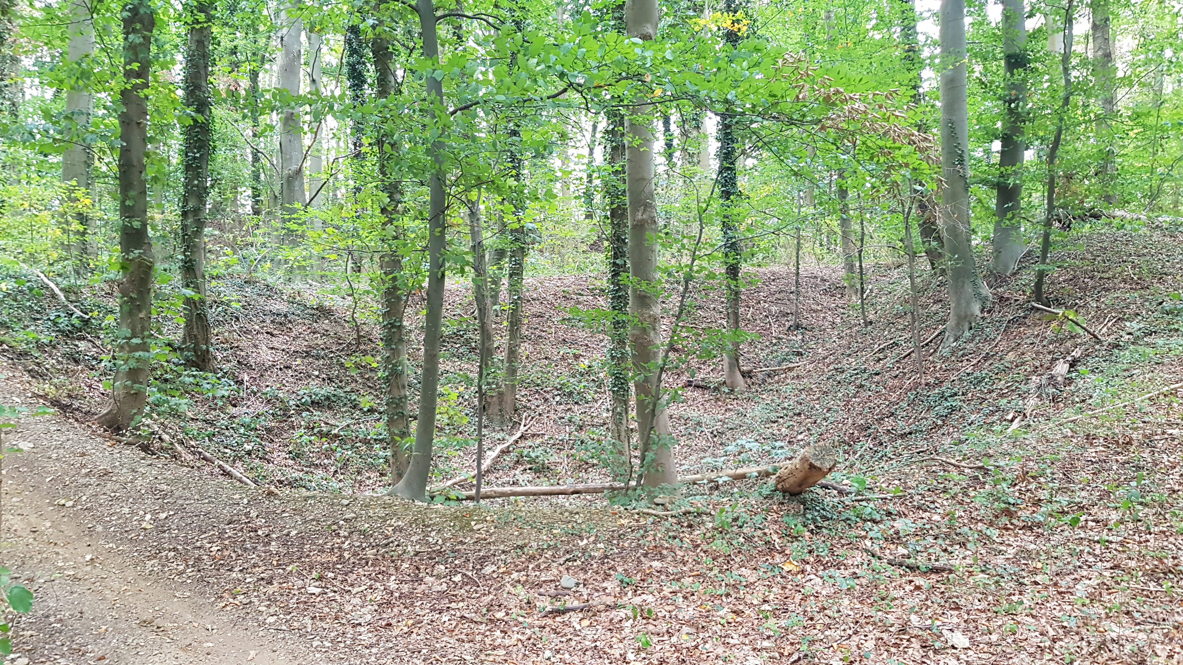 locatie van de ingang van de Oude Marendalgroeve, Maastricht, Nederland